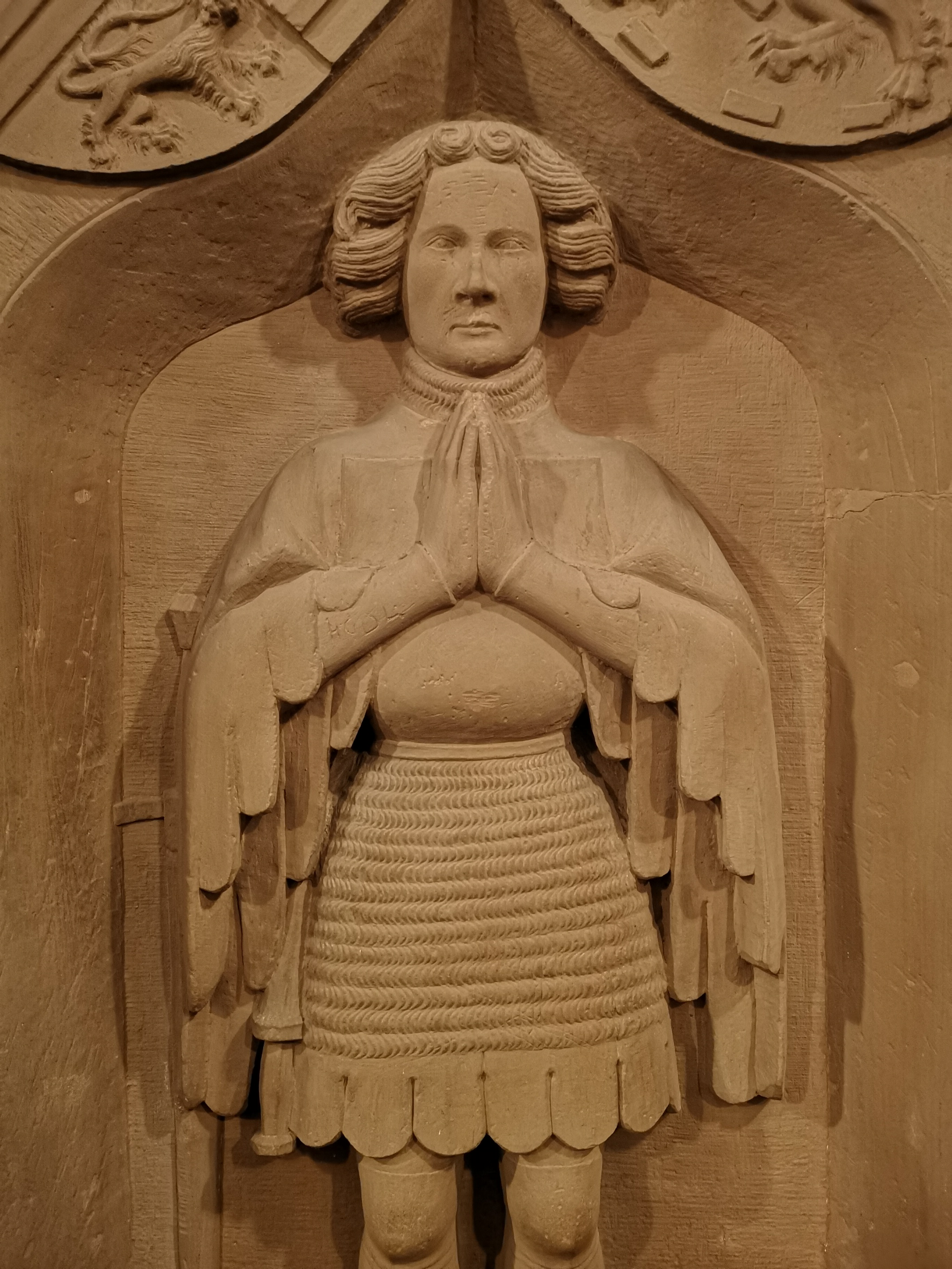 Grabplatte von Graf Johann IV. von Sayn-Wittgenstein (gest. 1412, inschr.) in der Stadtkirche Bad Laasphe (Detail)